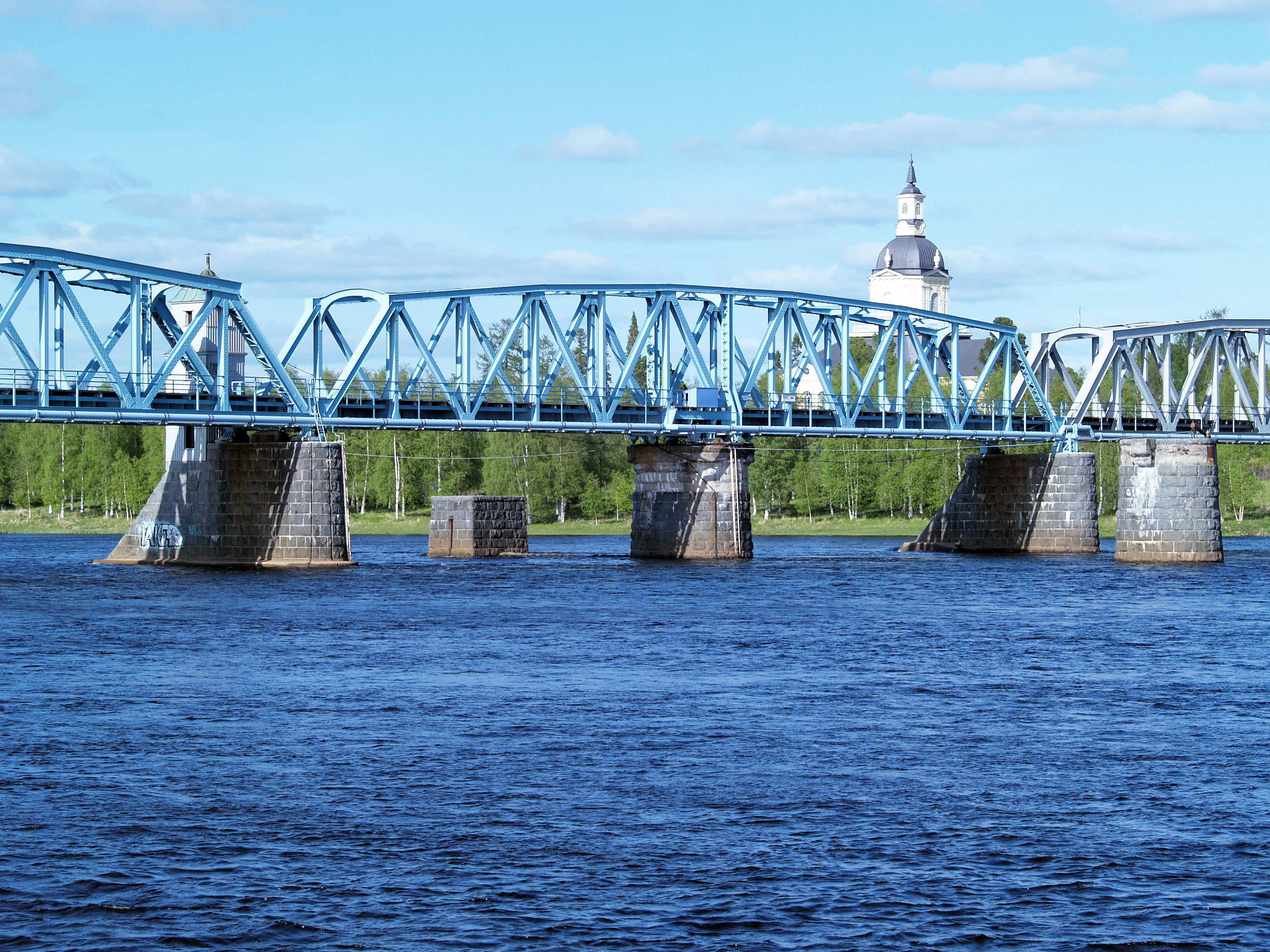 Einenbahnbrücke über den Torne älv. Grenzbrücke zwischen Haparanta und Tornio. Das drehbare Mittelteil der Brücke